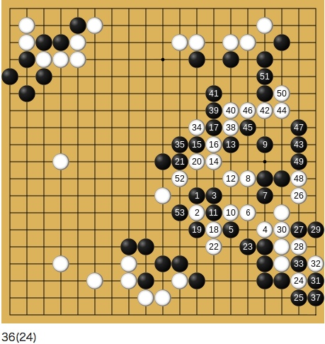 1978年3月1-2日 第2期棋聖戦挑戦手合七番勝負第5局 藤沢秀行棋聖(先番)-加藤劔正本因坊 51-103手目